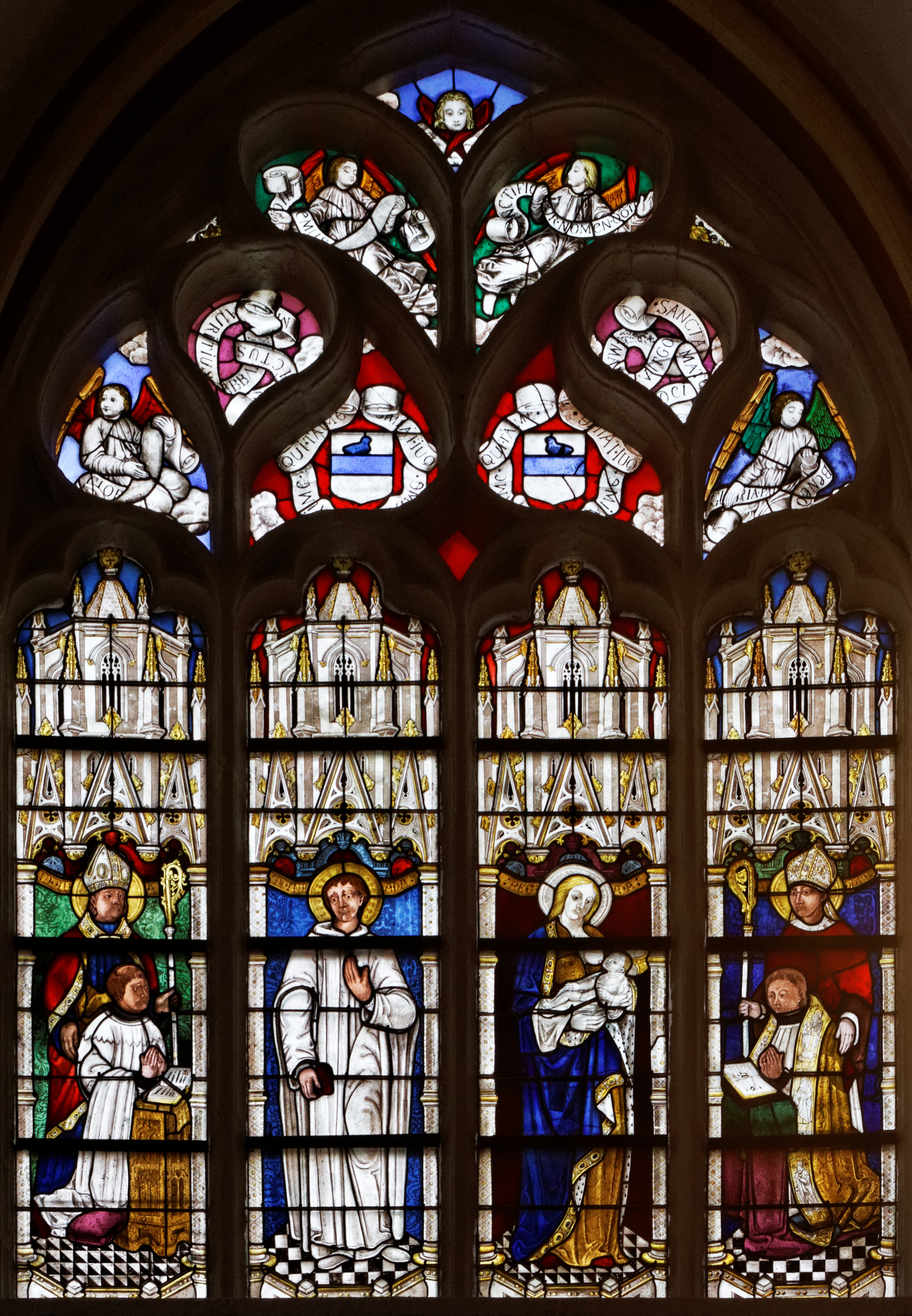 Baie 129 de la cathédrale Saint-Corentin à Quimper dans le Finistère. Verrière haute nord de la 2ème travée de la nef. Vitrail de Saint-Maurice de Carnoët. 1ère lancette: chanoine présenté par un saint évêque. 2ème lancette: Saint-Maurice de Carnoët. 3ème lancette: Vierge à l'Enfant. 4ème lancette: chanoine présenté par un saint évêque. Tympan: Anges portant des phylactères aux noms des saints de la verrière. Blason et devise Aime qui t'aime. Fin du XVème siècle.